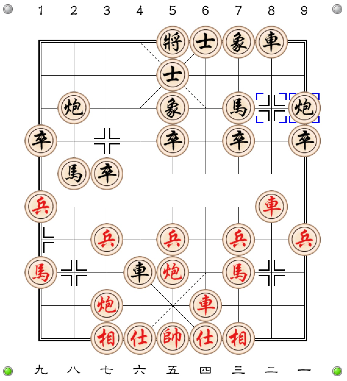 Mời đấu quân